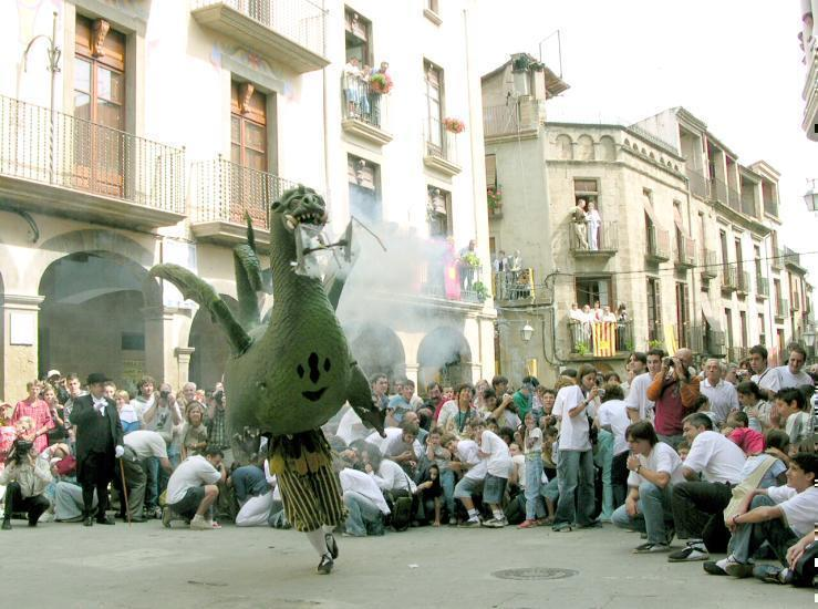 El Drac de Solsona executant el seu ball durant la Festa Major de 2003.